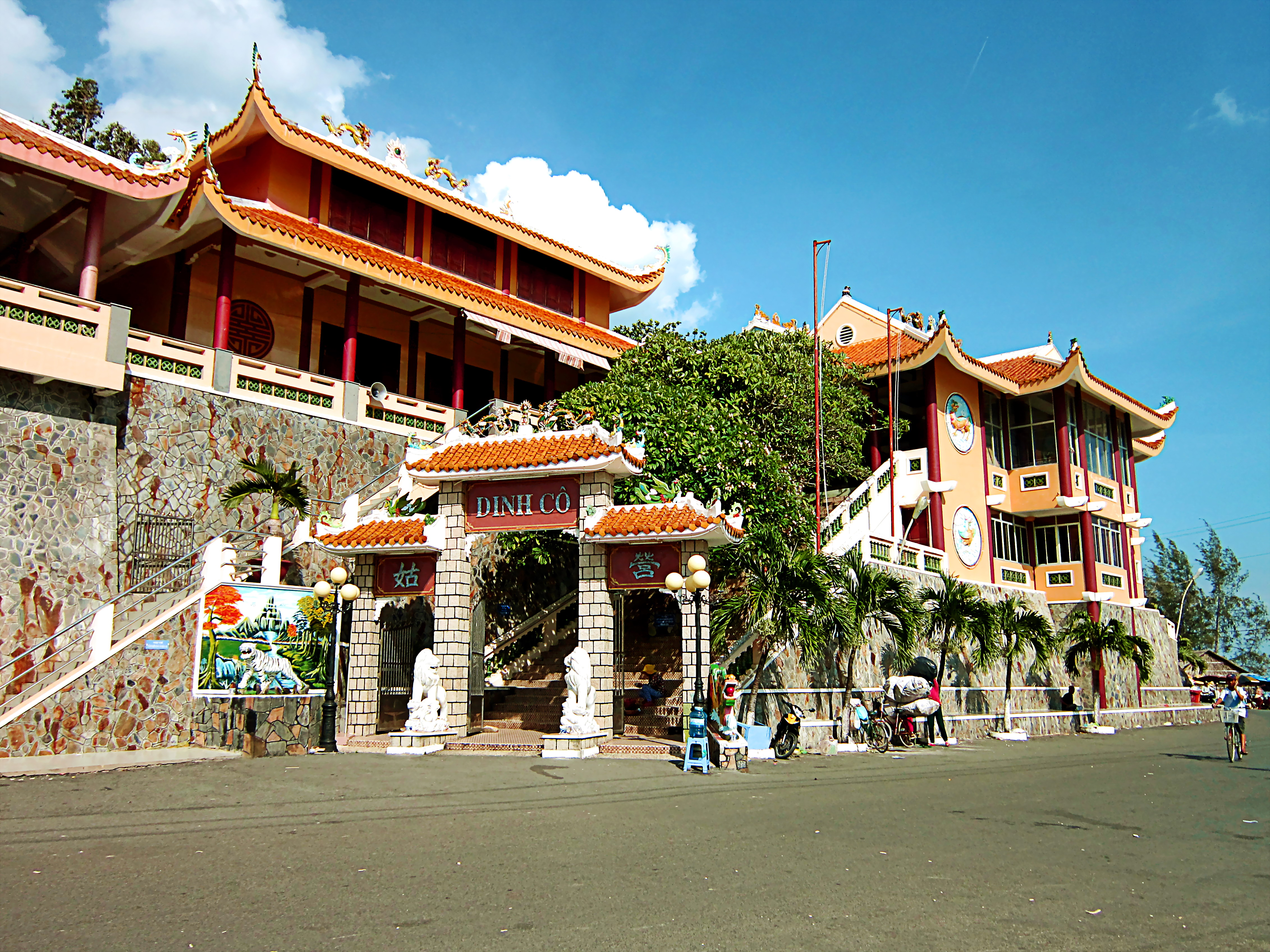 Dinh Cô ở thị trấn Long Hải, huyện Long Điền, tỉnh Bà Rịa-Vũng Tàu, Việt Nam.